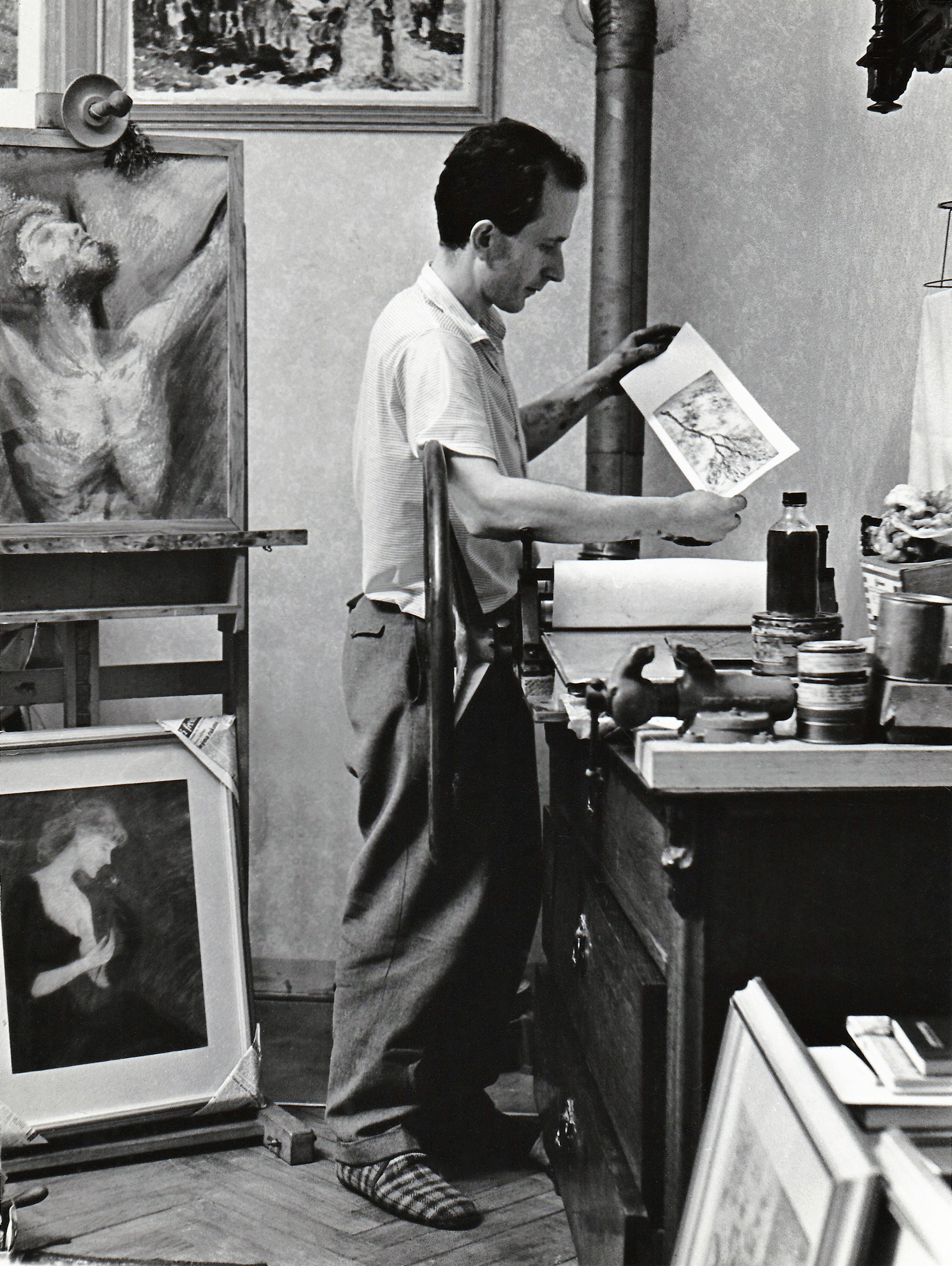 Vratislav Jan Žižka